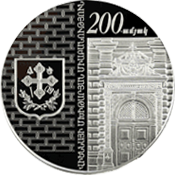 Памятная монета Армении 2011 года "Мхитаристы" - 1000 драм - серебро 925